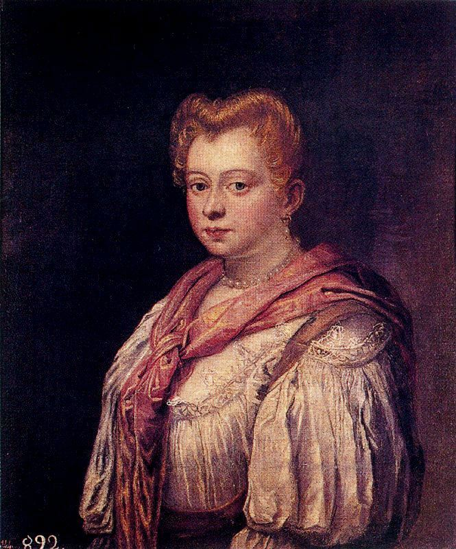 Dama veneciana, Museo del Prado